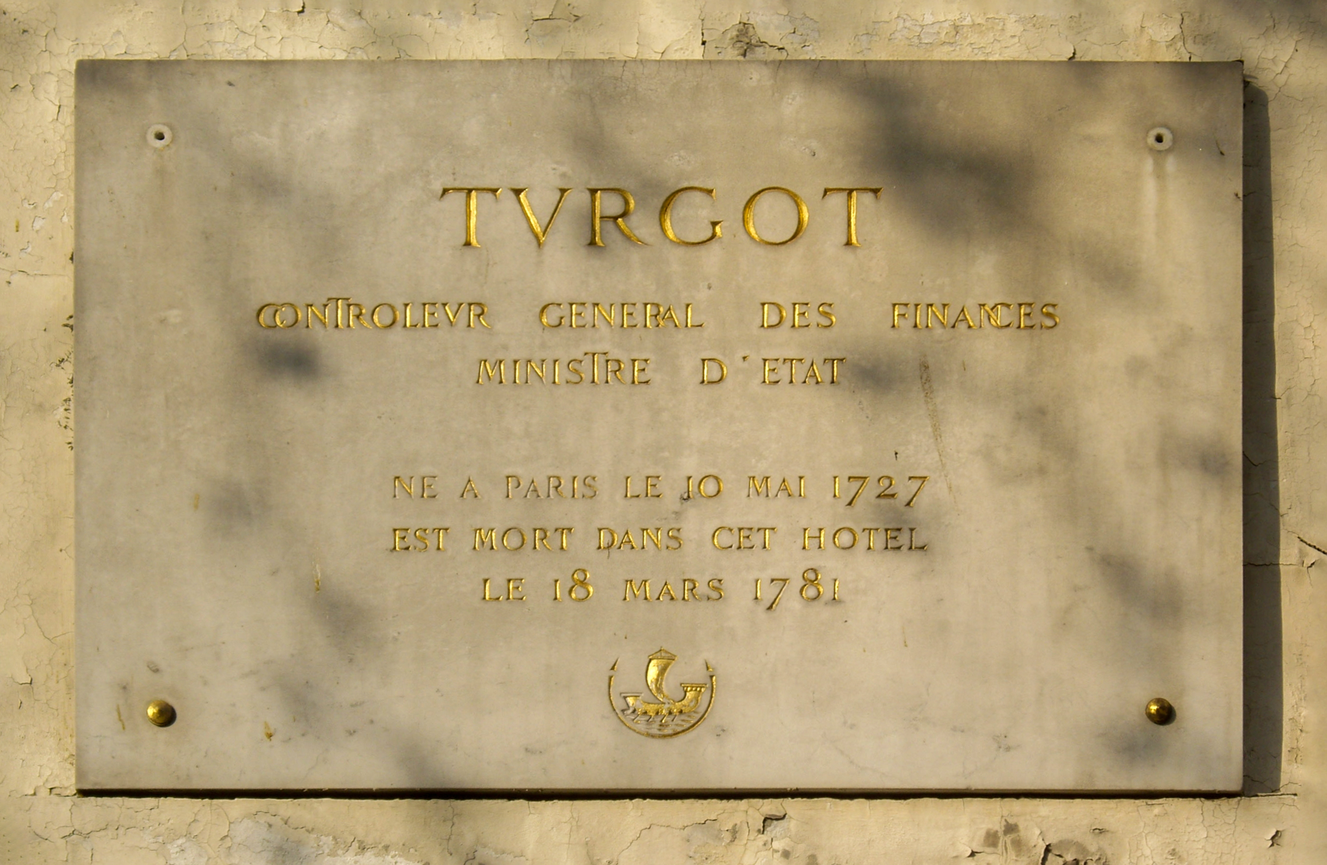 Plaque apposée sur l'hôtel particulier au n° 108 de la rue de l'Université, Paris 7e, où le contrôleur général des finances Turgot (1727-1781) passa les dernières années de sa vie et mourut le 18 mars 1781.